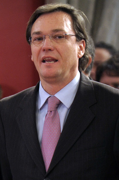 06-07-2012 Primera tronadura de mina Chuquicamata subterránea